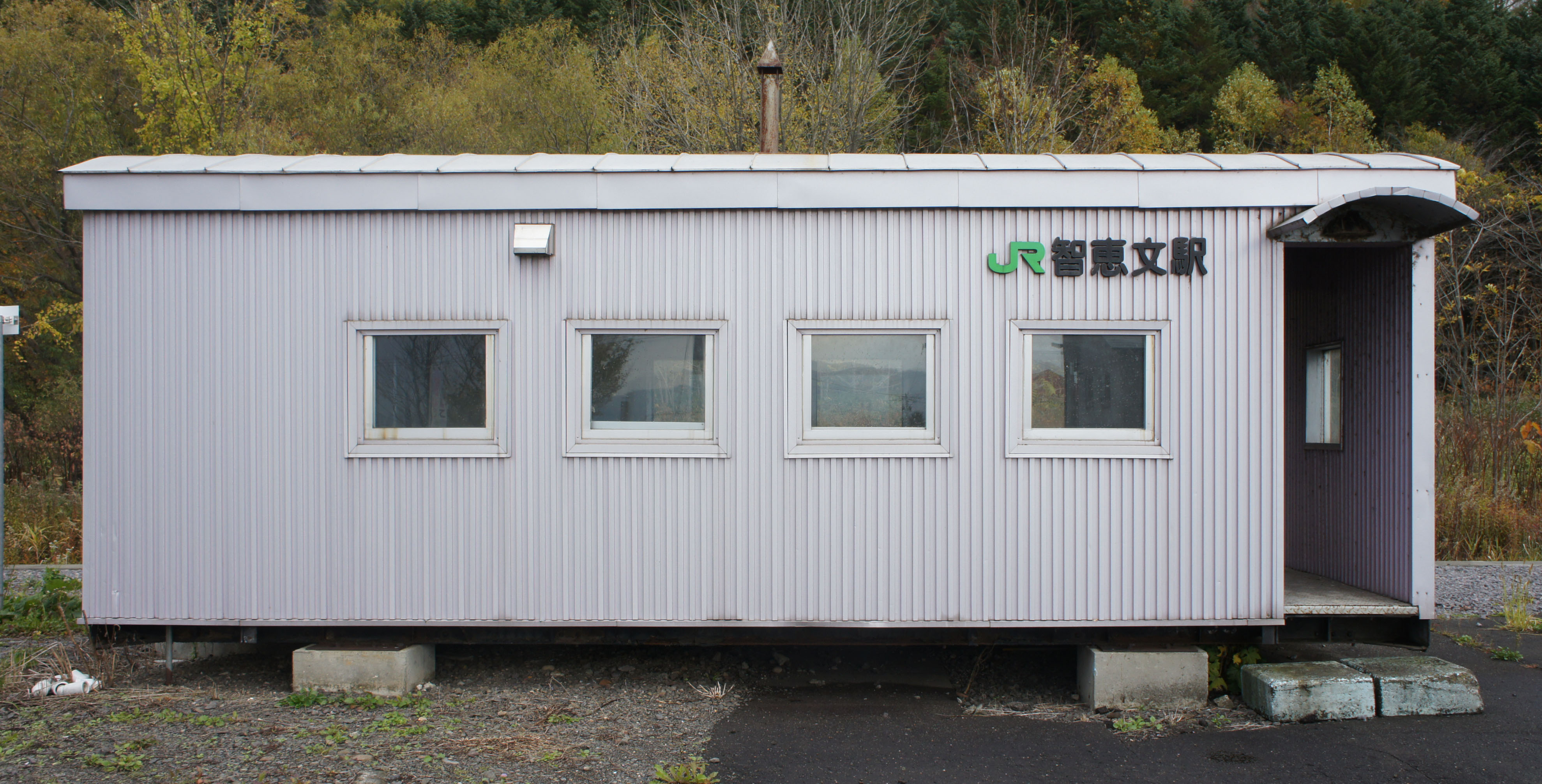 JR宗谷本線・智恵文駅の駅舎 Sony NEX-3